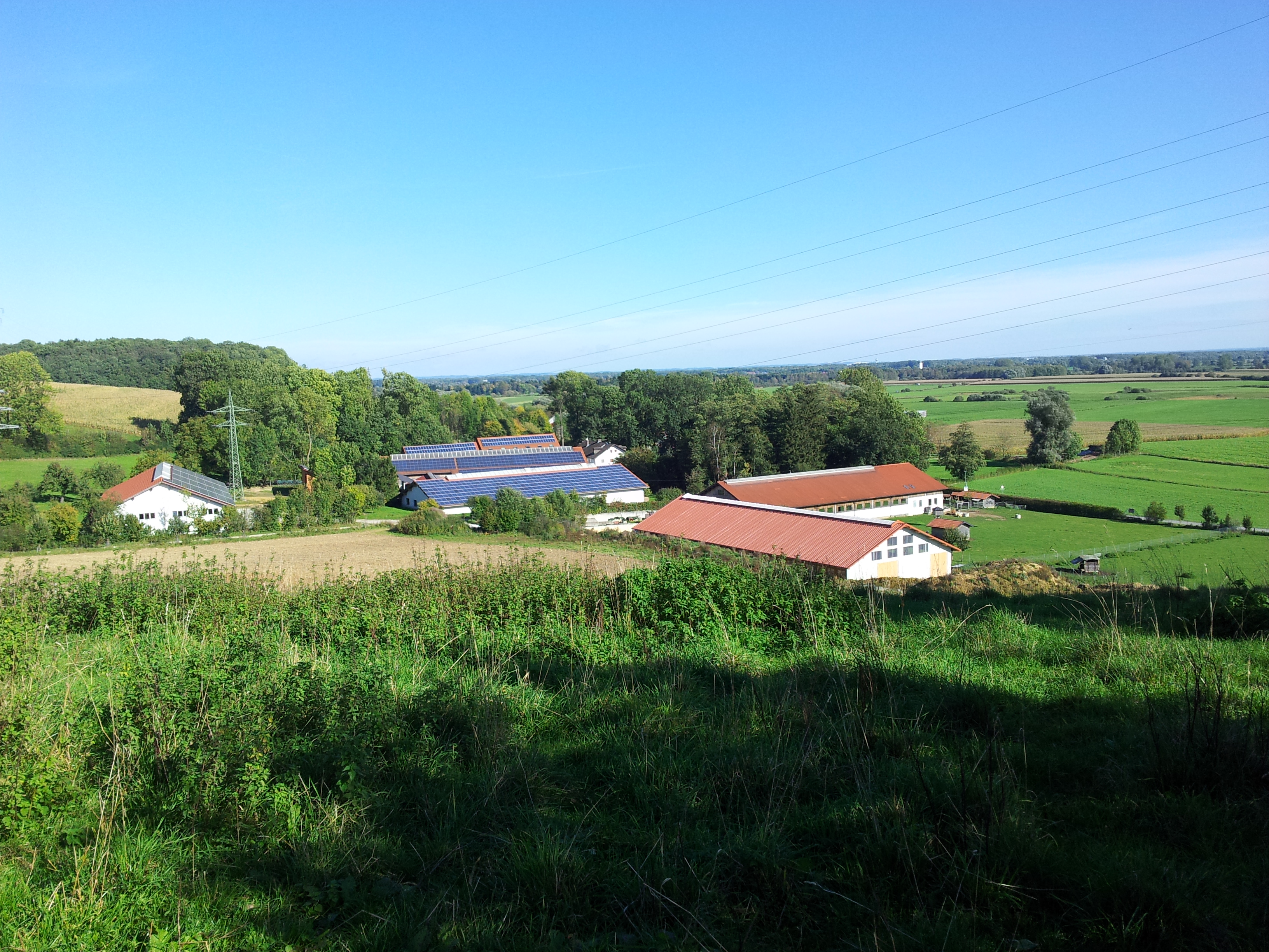 Pallhausen; Ortsteil von Freising